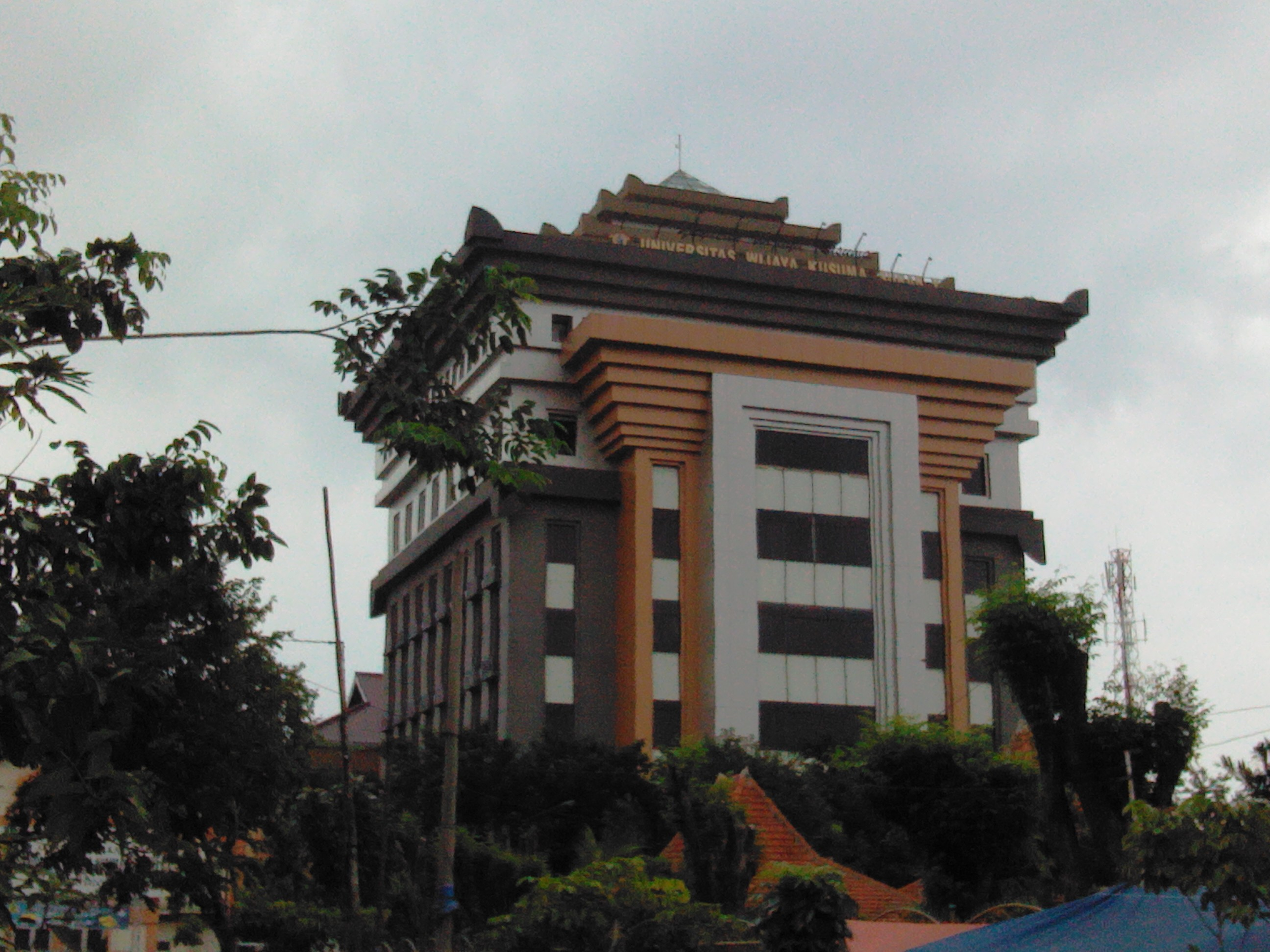 Foto gedung Universitas Wijaya Kusuma Surabaya